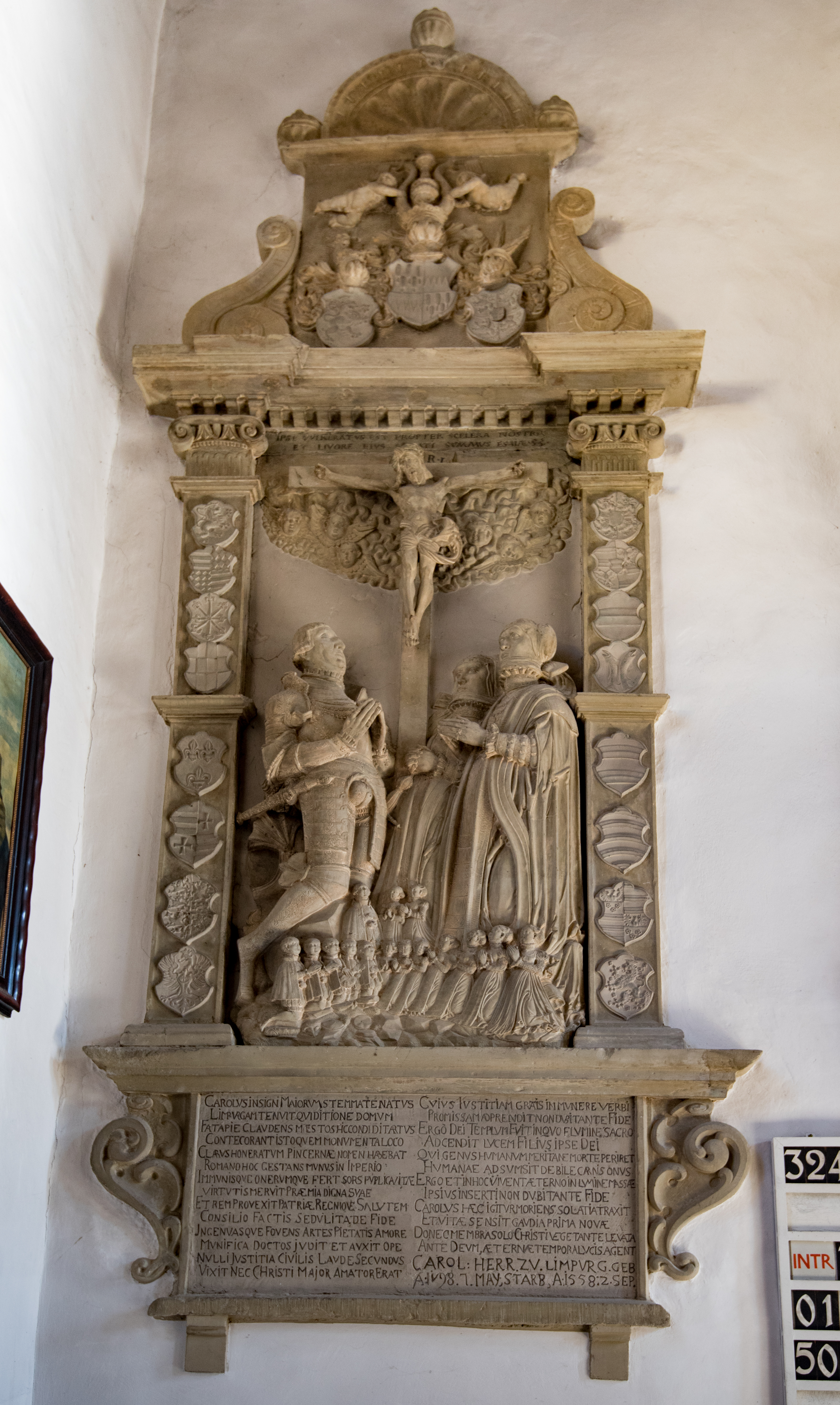 Markt Einersheim, Kirchplatz 1, Evang.-Luth. Pfarrkirche St. Matthäus